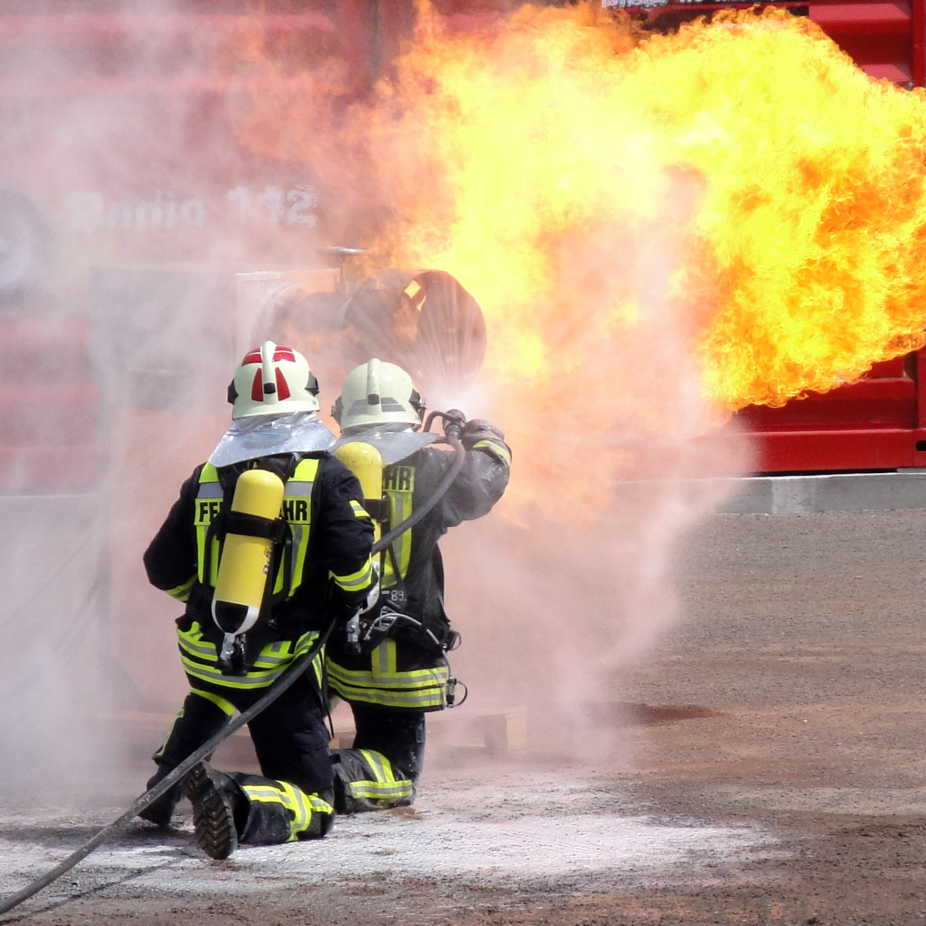 Vorführung Brandbekämpfung auf der Interschutz 2010